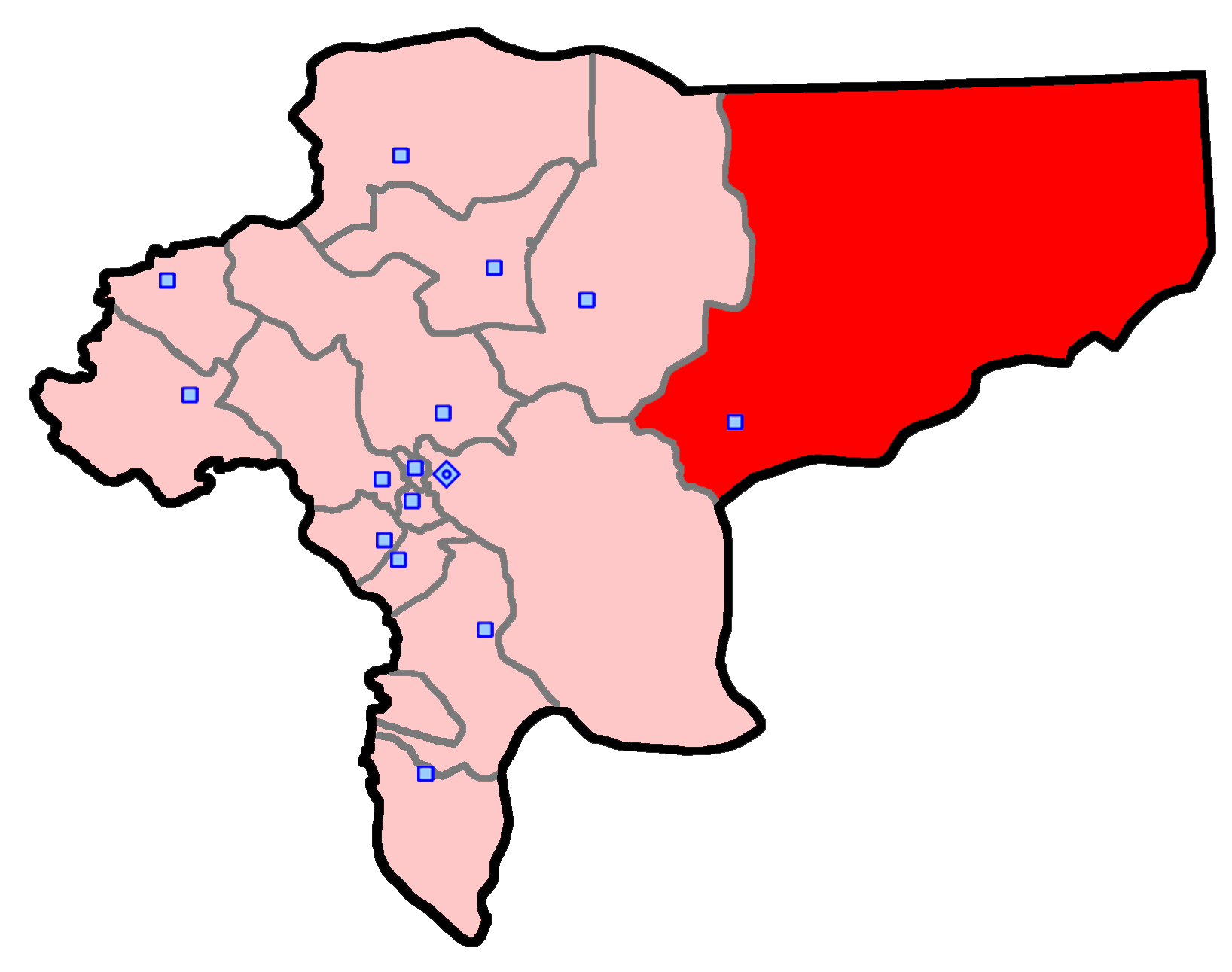 حوزهٔ انتخاباتی نایین و خور و بیابانک برای انتخابات مجلس شورای اسلامی